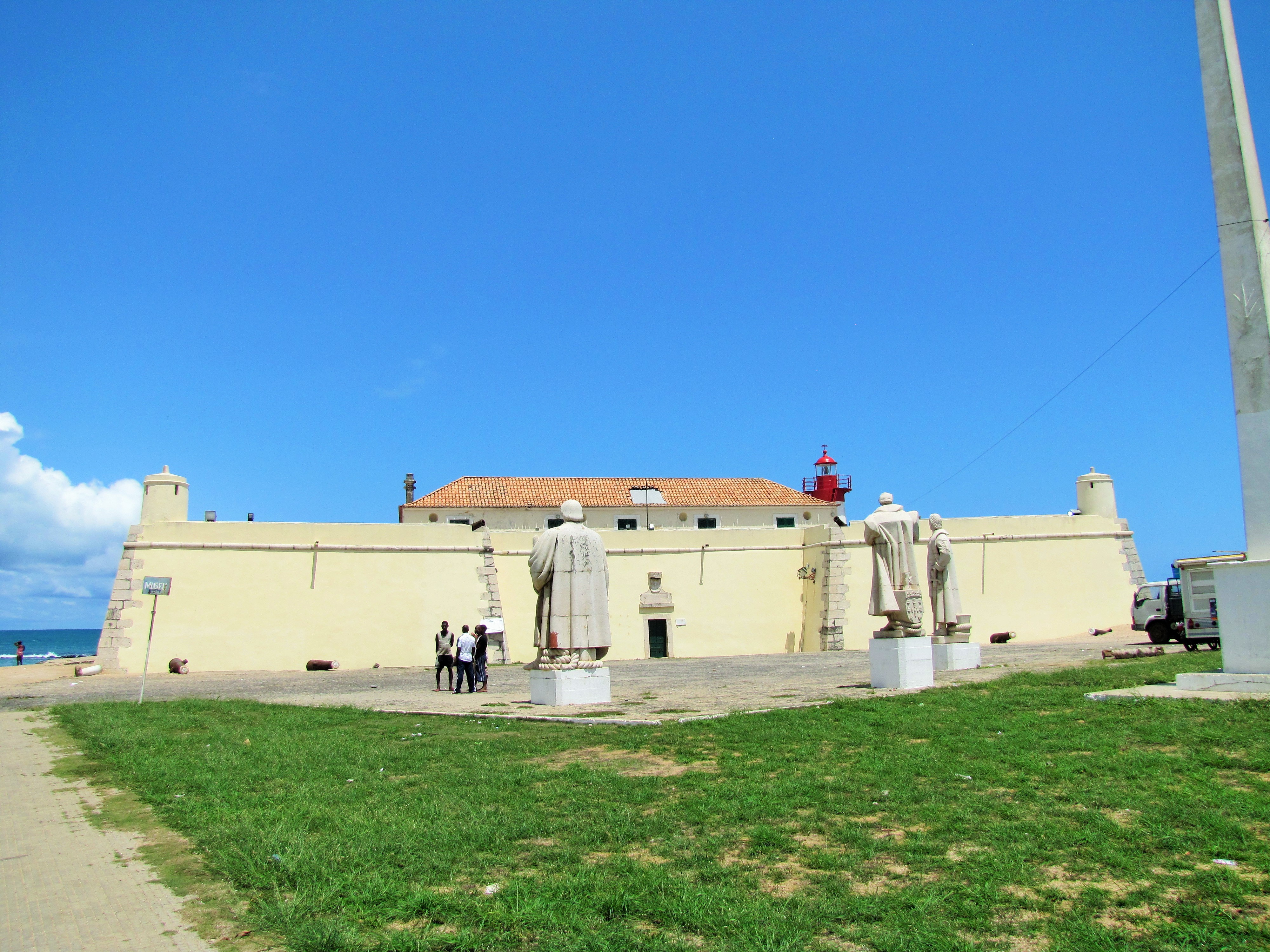 Forte de São Sebastião National Museum (São Tomé)